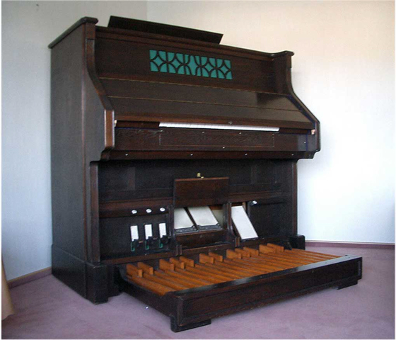 Beschreibung:Lindholm - Orgel - Harmonium, Bj. 1928 Manual I Viola 16' Prinzipal 8' Dolce 8' Forte Manual I Manual II Salicional 8' Oktavflöte 4' Fernflöte 4' Forte Manual II Manual I & II Manual Forte Manual Koppel Oktav Koppel Pedalwerk Gedecktbass 16' Dulcian 8' Forte Pedal Pedal Koppel Oktav Koppel Volles Werk Schweller Besonderheiten 4 1/2 Spiele Pedalwerk mit 30 Tonstufen Balgfüllungsanzeige Hand-Hebel-Kalkant Tretpedale Elektrisches Gebläse